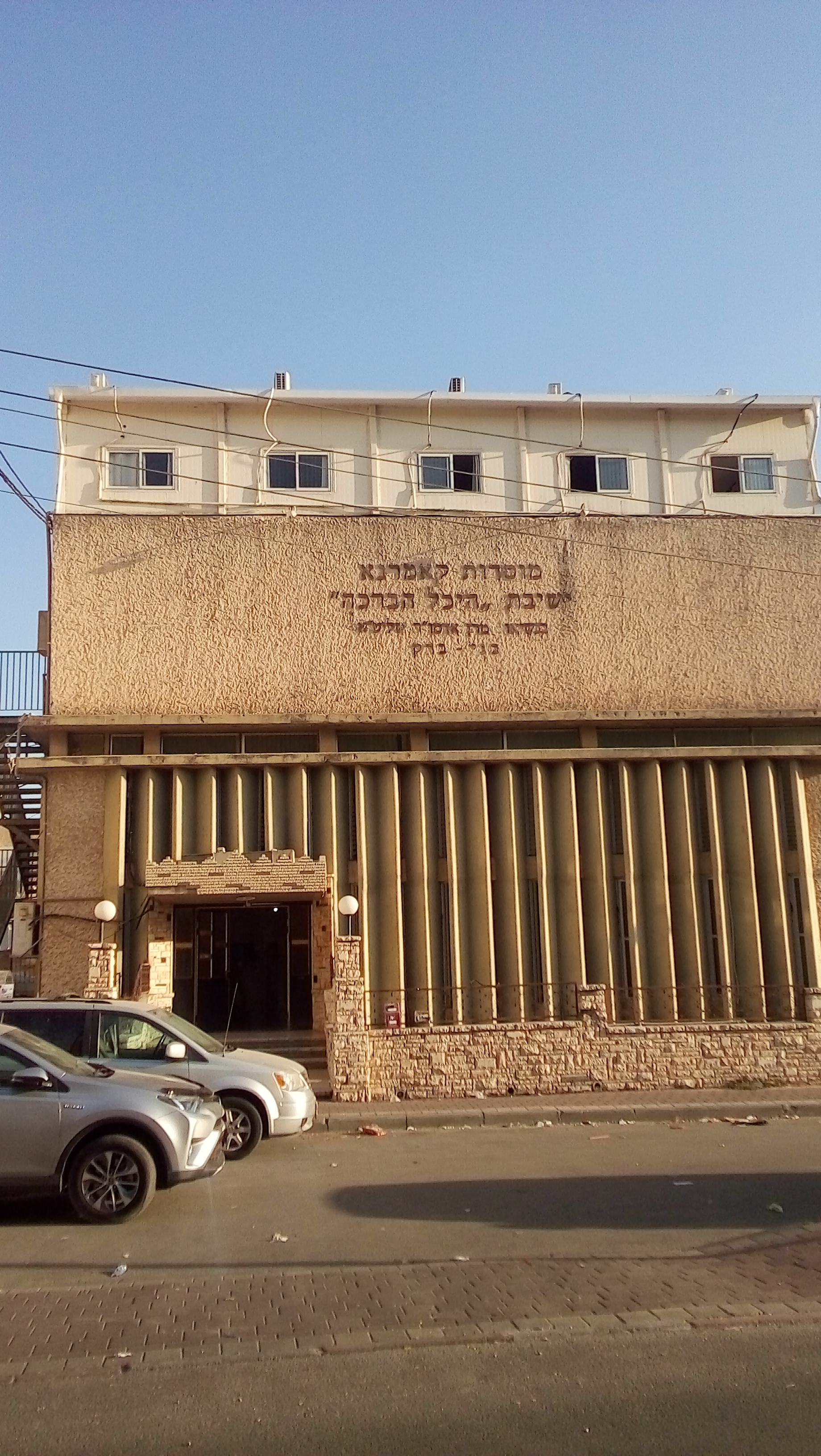 רחוב דבורה הנביאה בני ברק